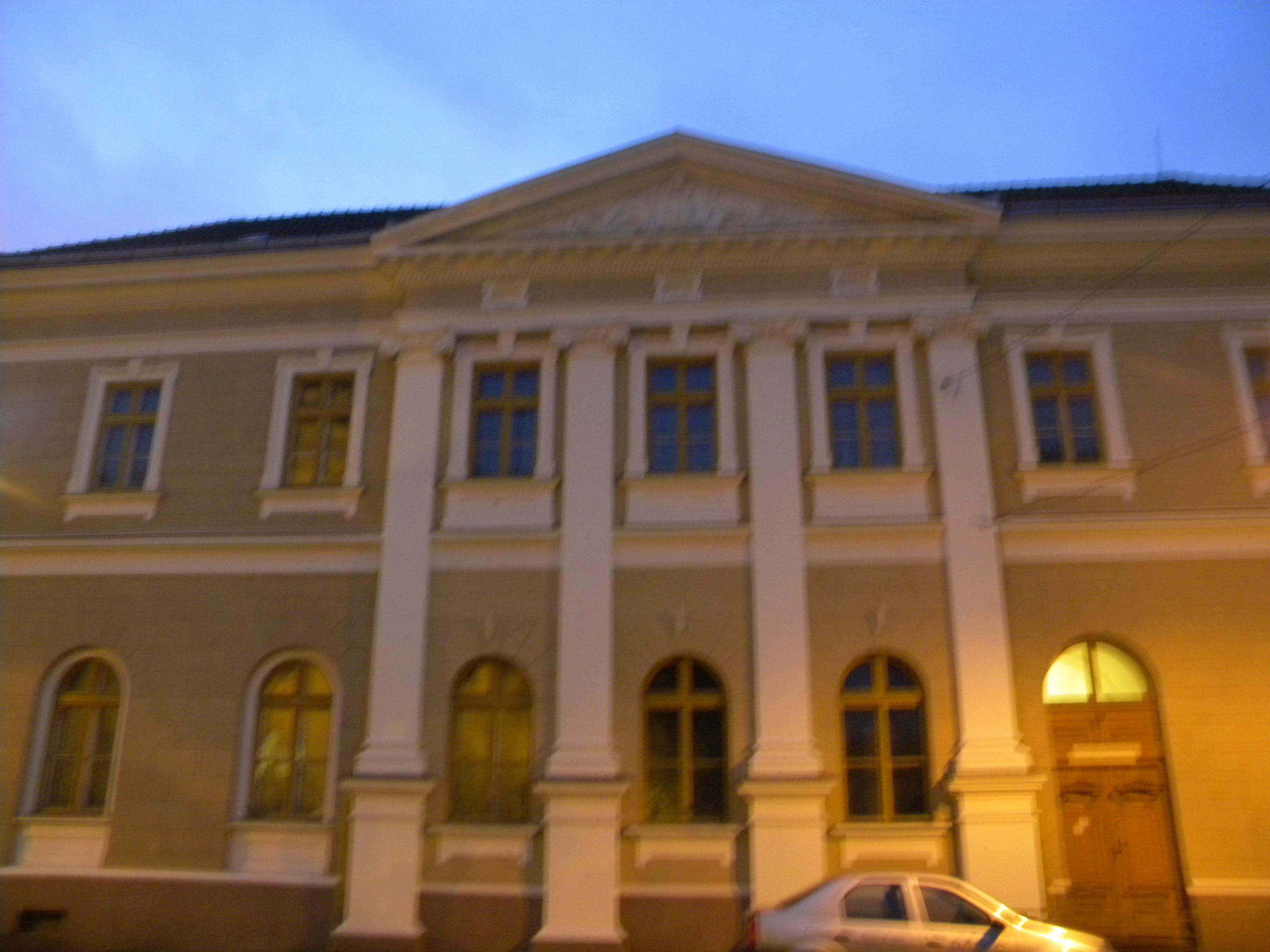 Hám János Római Katolikus Iskolaközpont (a püspöki palota egyik szárnya)